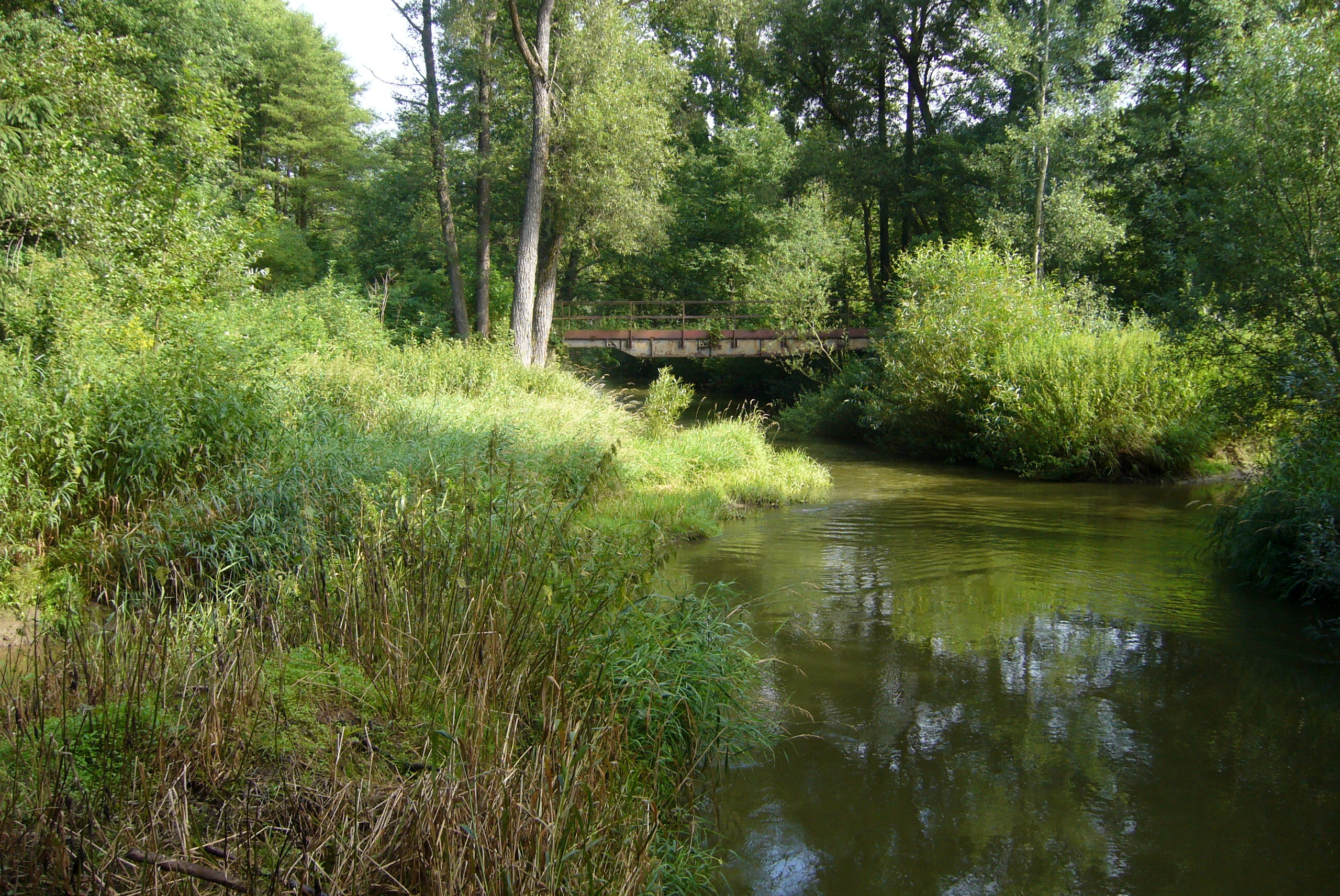 Soutok Stropnice a Vrážného potoka pod hradem Ostrolovský Újezd.